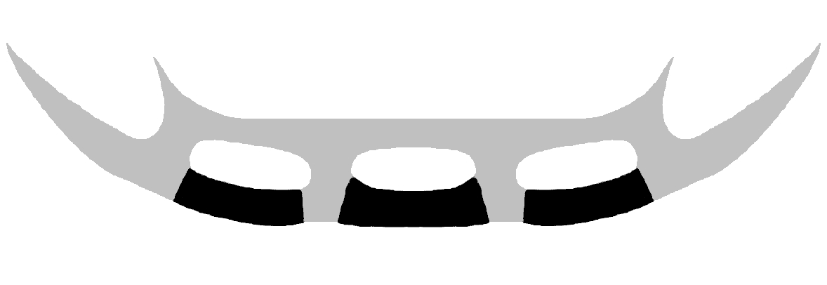 Eenvoudige tekening van een Klingonzwward, een zogenaamde Bat'leth. Eigen werk, gemaakt door Sindala op 2 april 2007, als illustratie bij het gelijknamige hoofdstuk in het artikel Klingon wapens op de Nederlandse wikipedia.